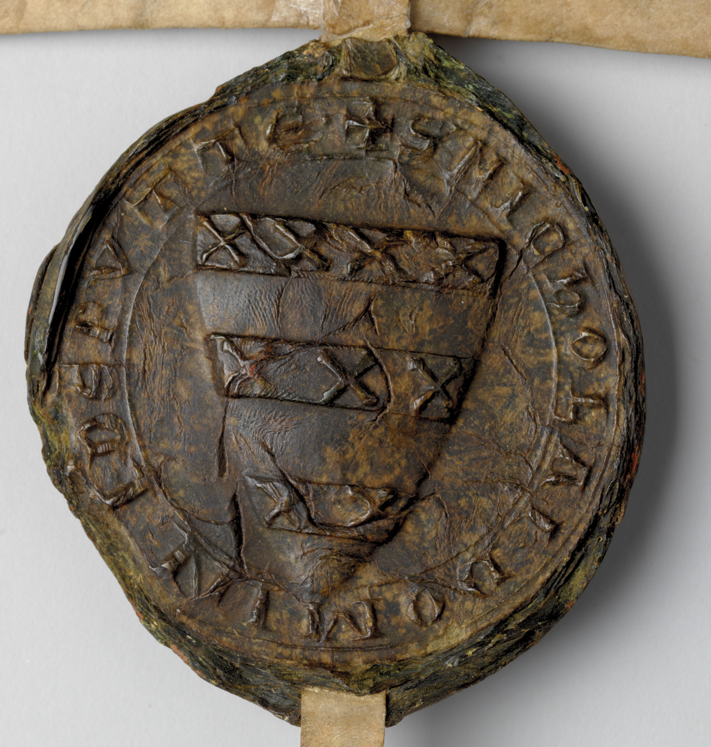 Zegel Nicholaus (Nicolaas I van Putten) uit 1241. De Latijnse randtekst luidt: S Nicholai Domin ids Putte (oftewelː sigillum (=zegel) Nicolaas Heer van Putten). Het zegel hangt aan een document in het Latijn over de tienden van Almsvoet (een verdronken dorp ten oosten van de Hoekse Waard en Strijen, nu Biesbosch). Het is één van de oudst bekende zegels van de Heren van Putten. Het wapen van Spijkenisse is gebaseerd op dit wapen. Bron foto: Rijksarchief Utrecht, NL-UtHUA_A69682_000005.jpg. Archief: 220 Kapittel van Sint Pieter te Utrecht, archiefstuk nr. 258-1, regestnummer 35, OSU-nummer 975.